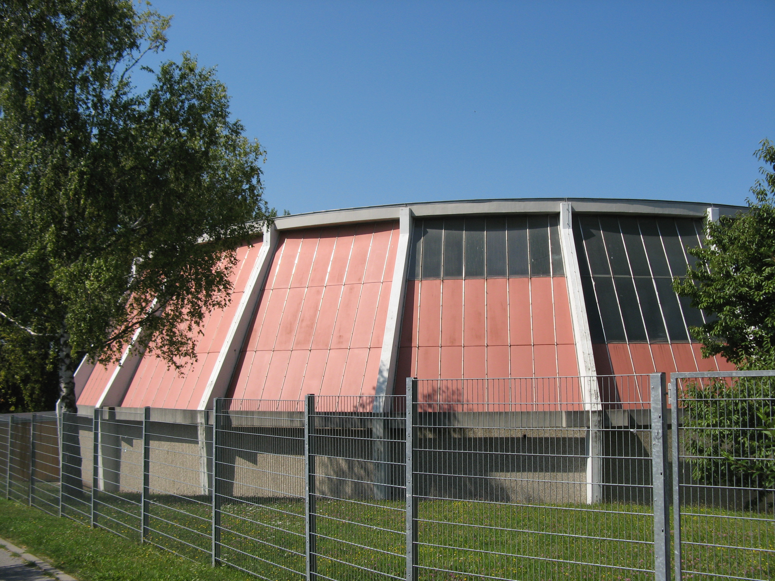 Sporthalle, Wendstattgasse 5, Per-Albin-Hansson-Siedlung Ost, Wien-Favoriten